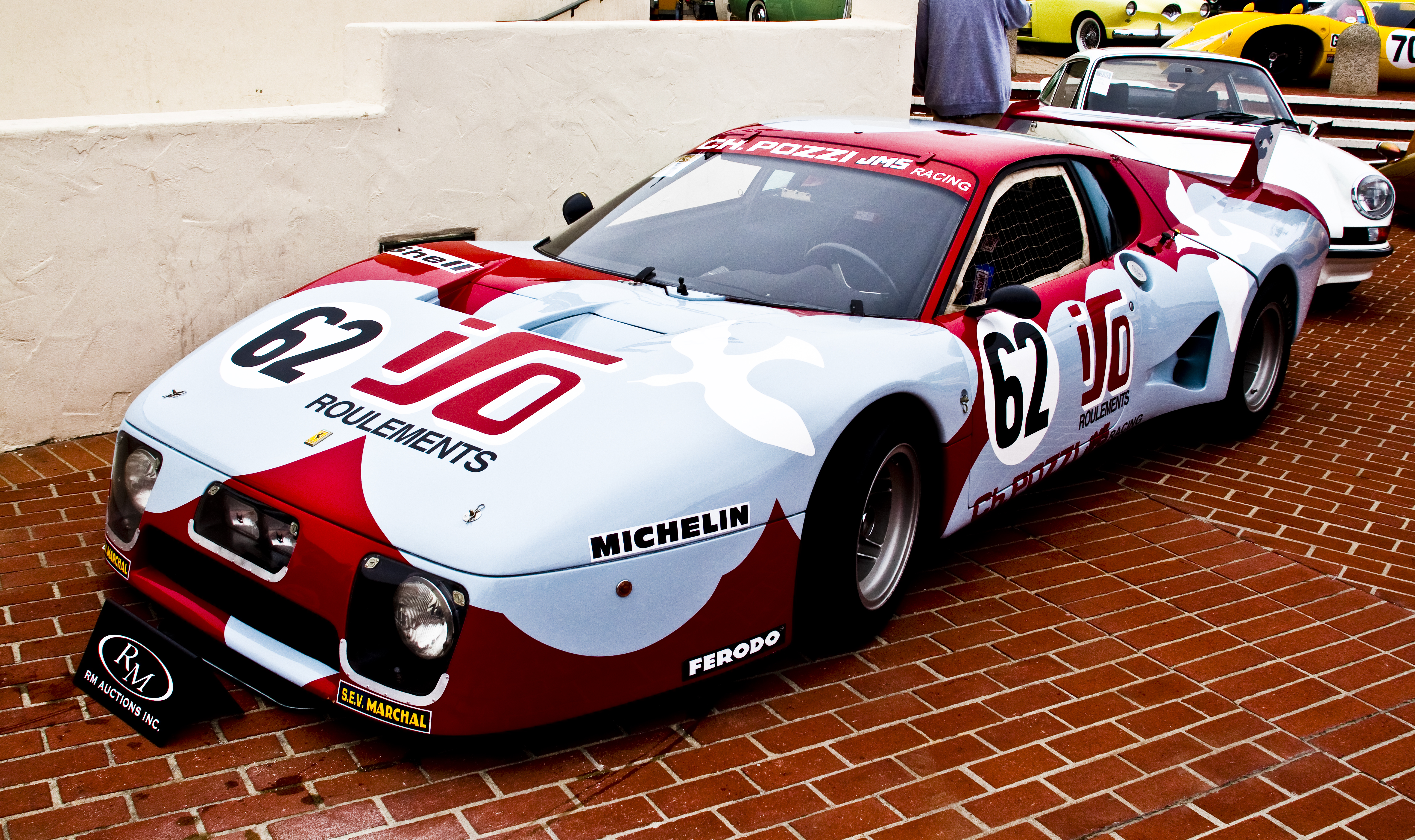 Ferrari Berlinetta Boxer Competizione (ex Pozzi racing) at 2010 RM Auctions